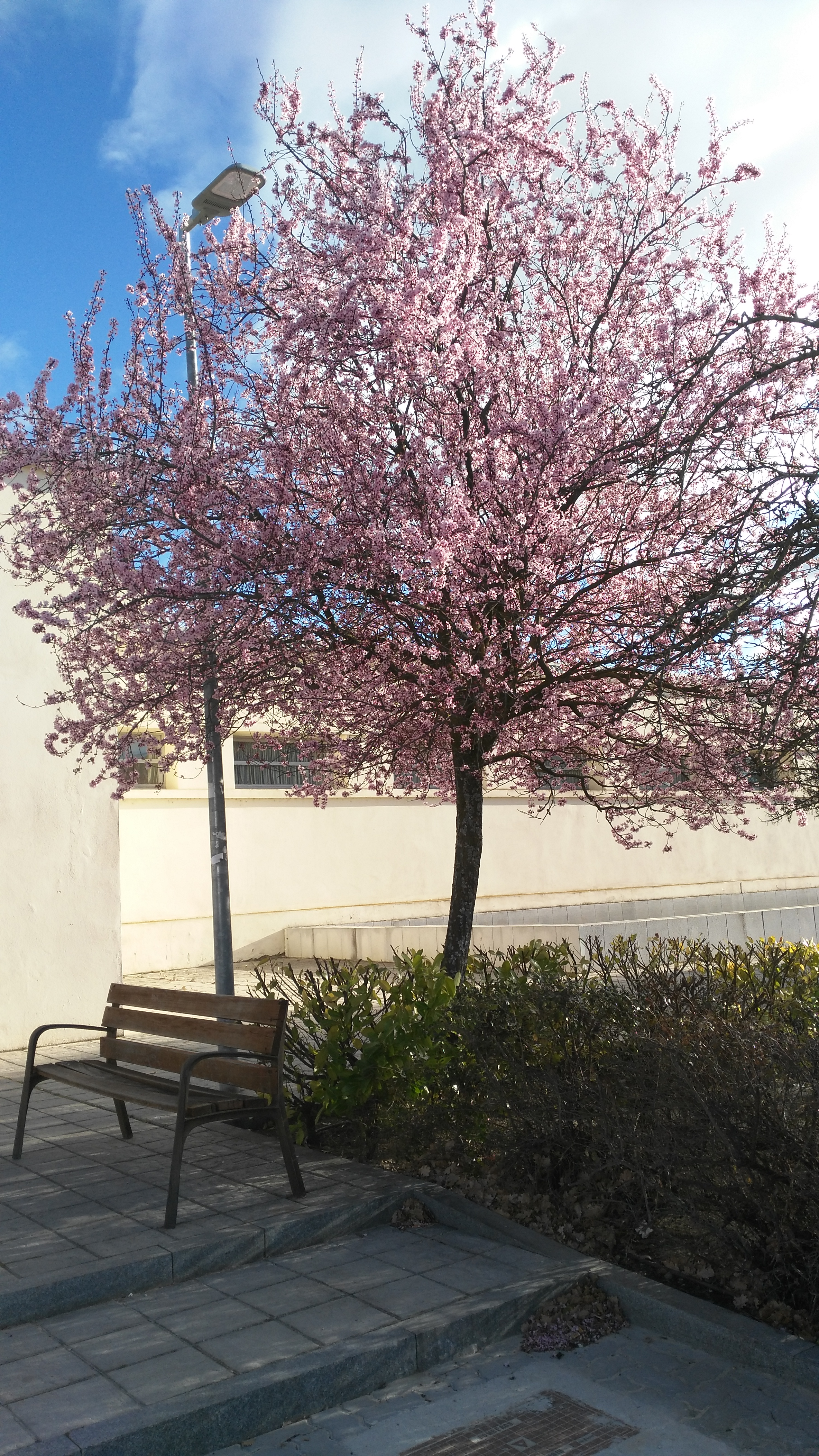 Es un ciruelo japonés. también llamado ciruelo chino que está plantado en el Campus de la Yutera (Palencia, Universiad de Valladolid)